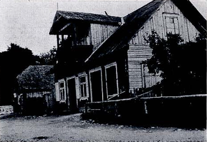 Беларуская (тарашкевіца): Тургелі (Turgieli), неідэнтыфікаваная вуліца